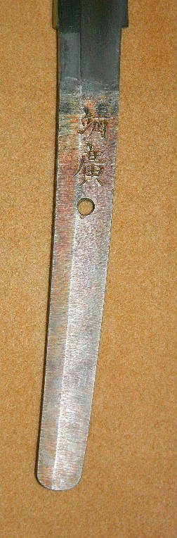 靖国刀 銘：靖廣